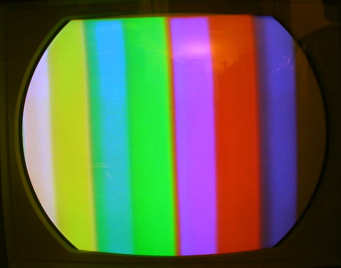 Farbbalkentestbild auf Farbfernseher von 1956 (NTSC)